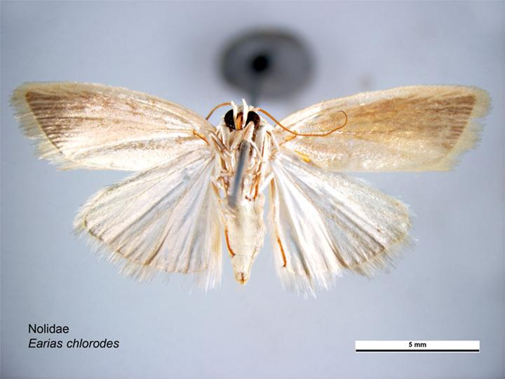 Earias chlorodes ventral view